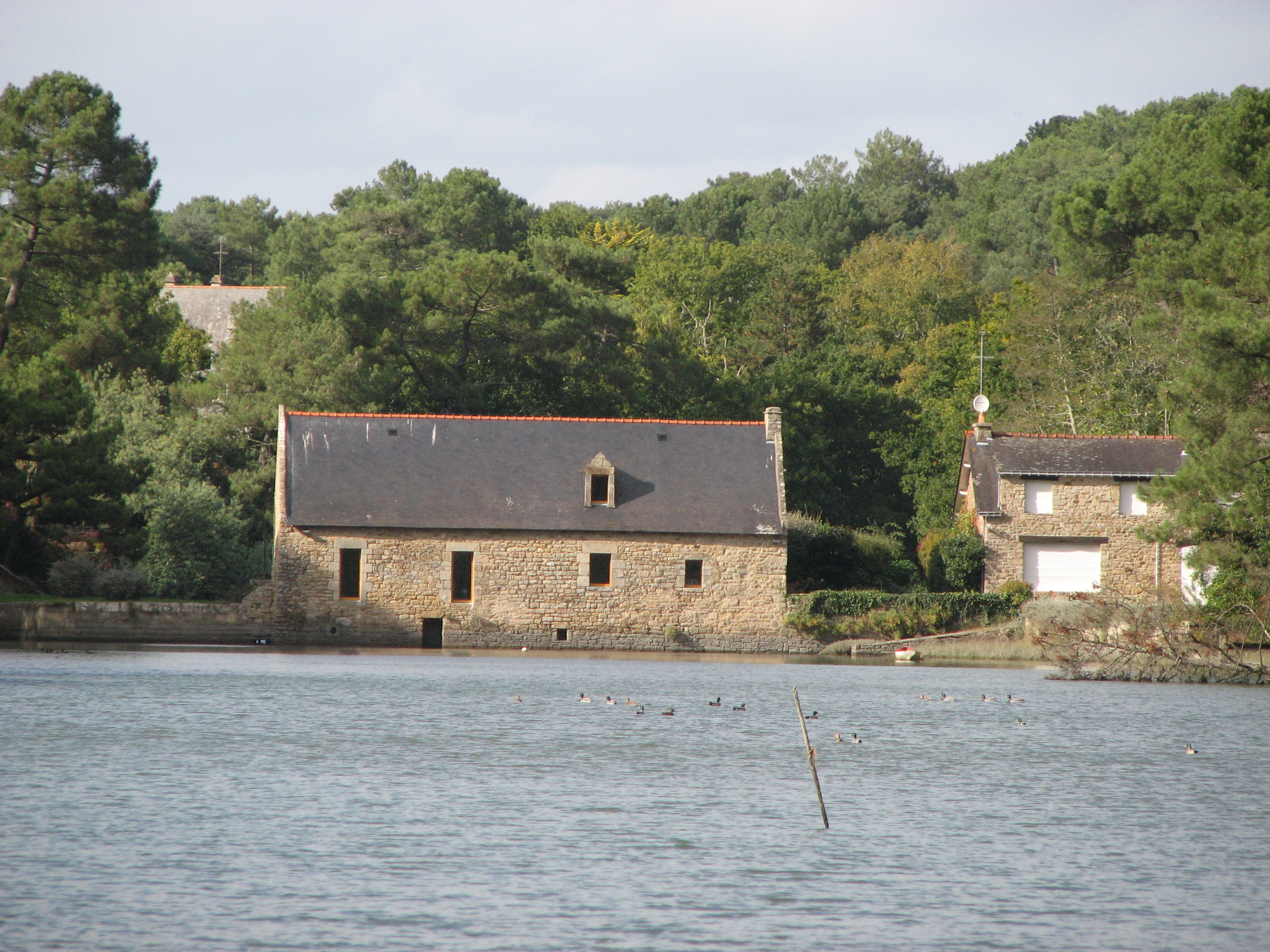 Moulin à marée de Campen (Vannes / Arradon)